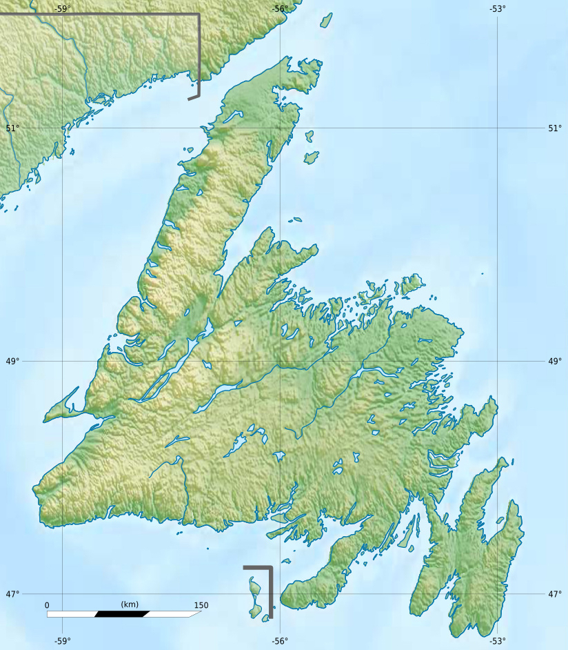 Carte physique de Terre-Neuve, Canada. Projection équirectangulaire. Image étirée N/S de 160%. Coordonnées des bords de carte : Top : 52.1 Bottom : 46.52 Left : -59.85 Right : -52.03